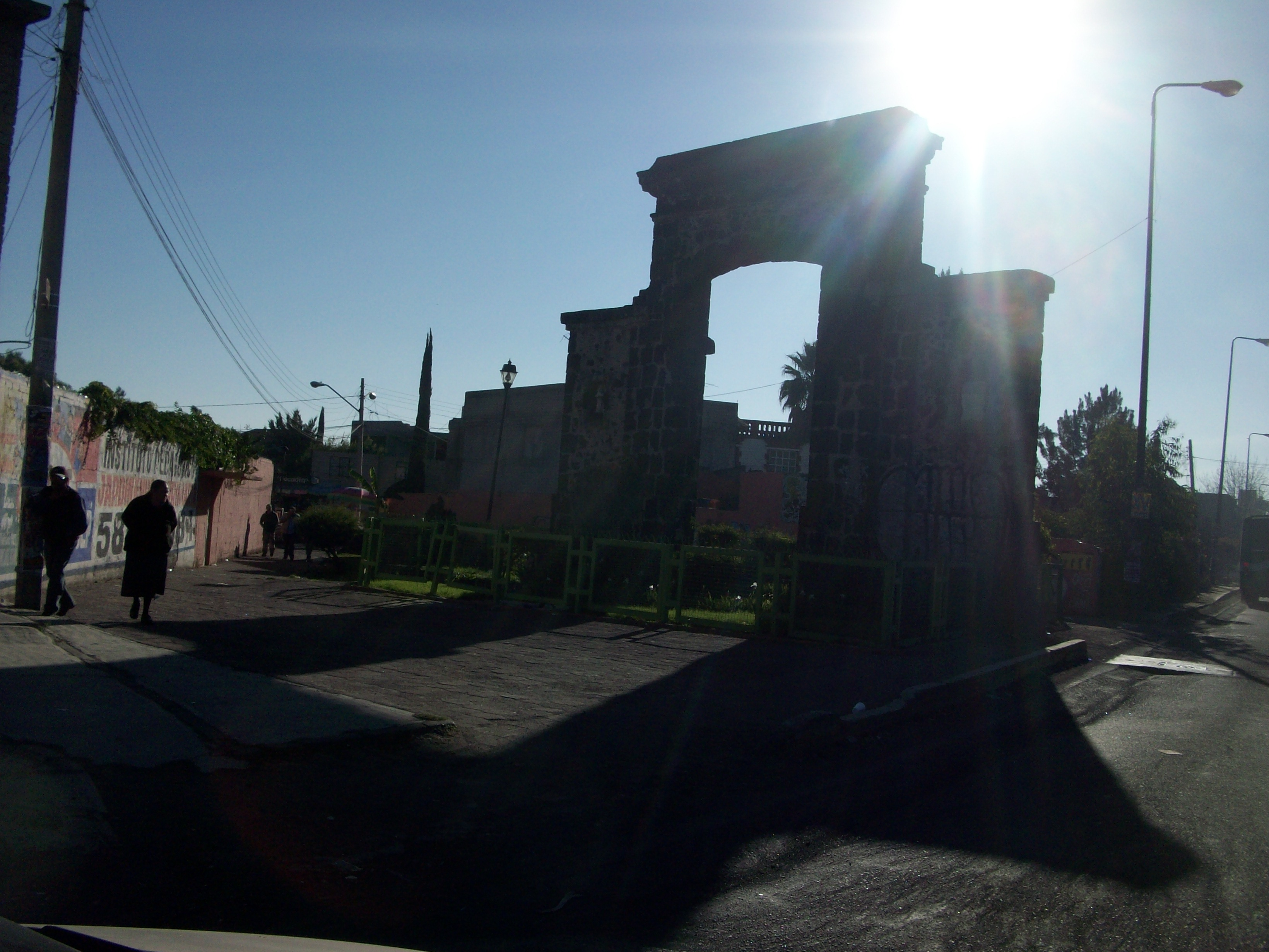 Arco Tlaltenco